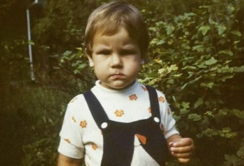 Lapsena